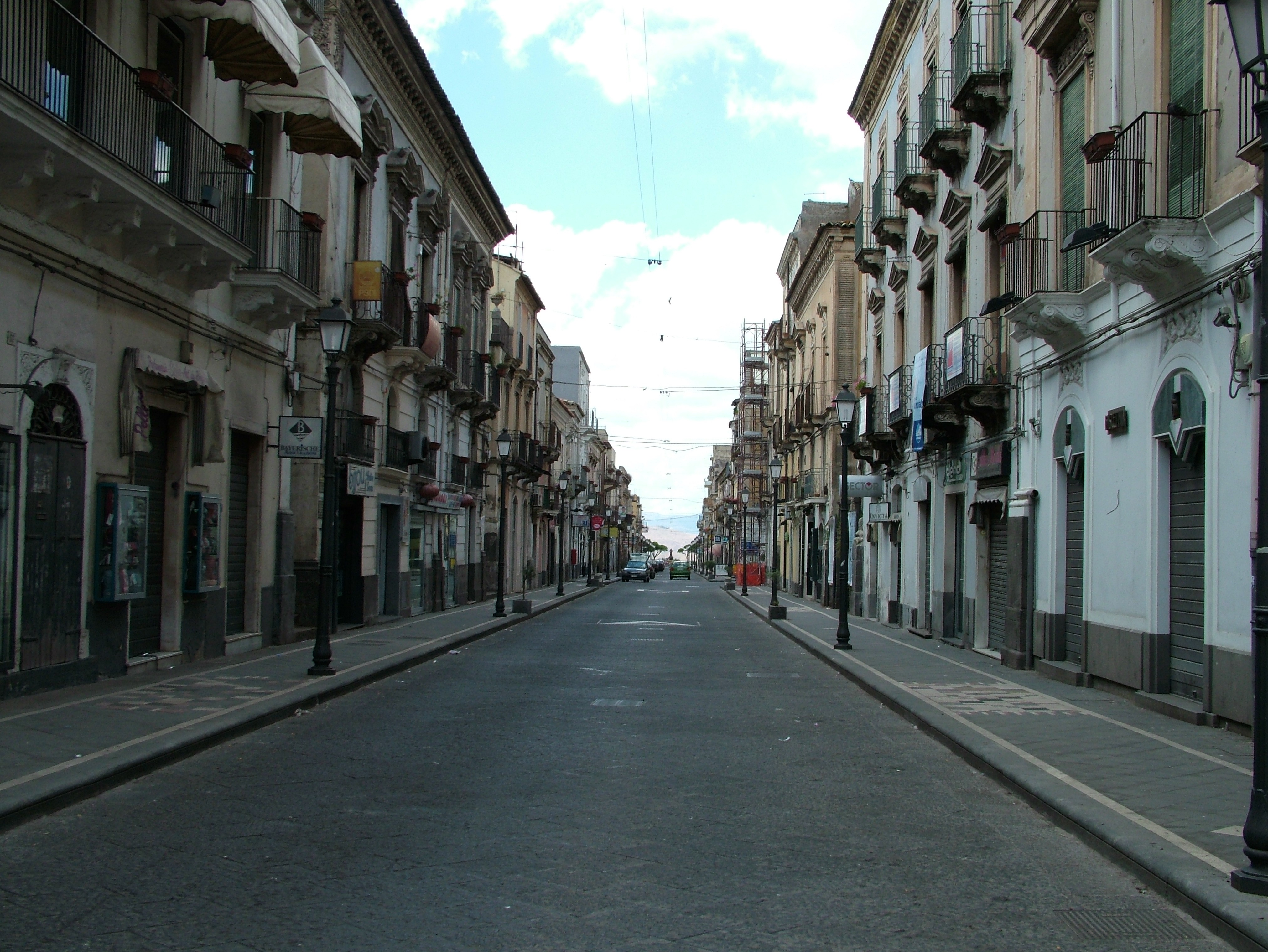 Adrano, Sizilien, die Straße Corso Garibaldi